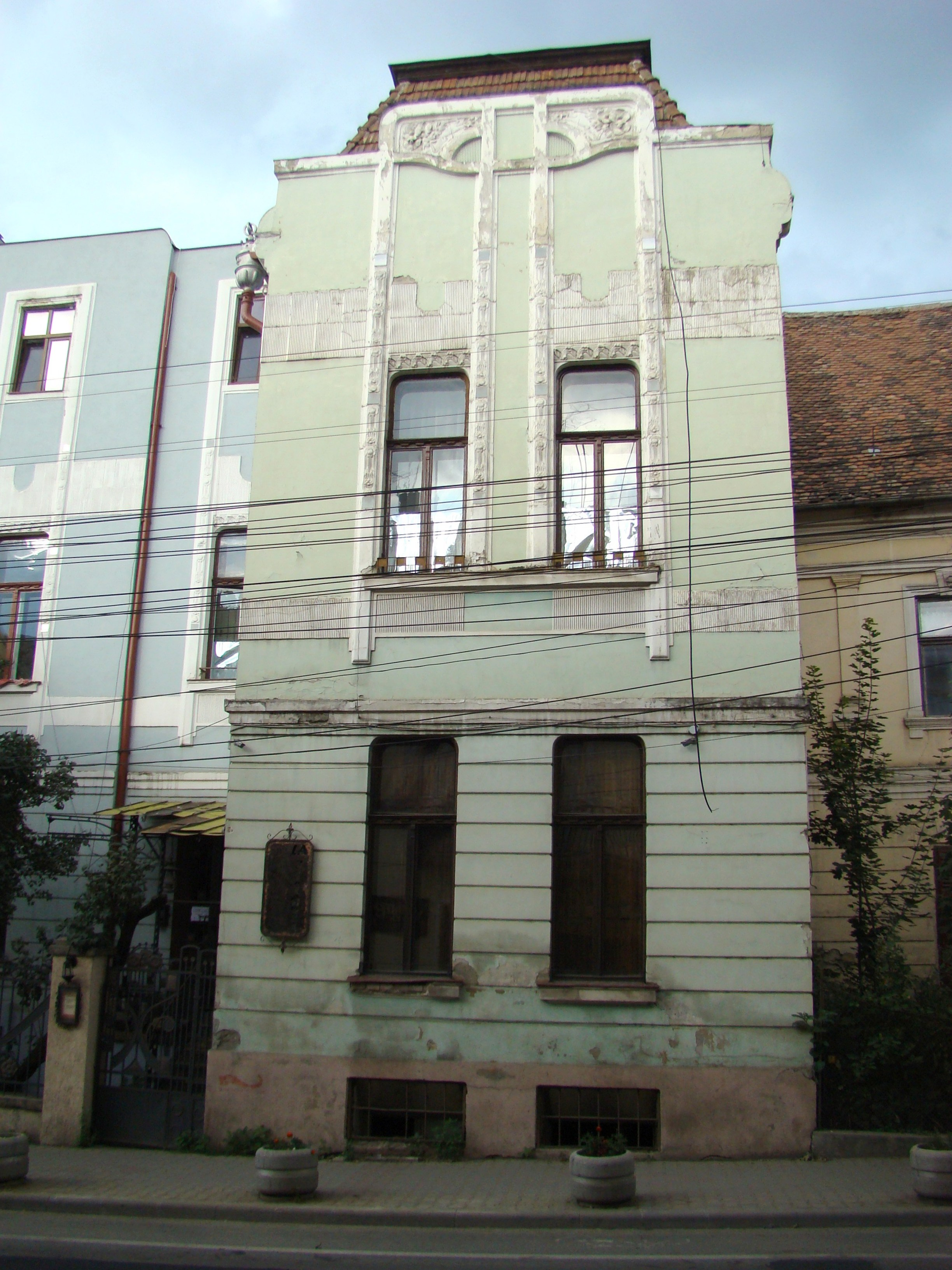 Clădire monument istoric, str.Republicii, nr. 7